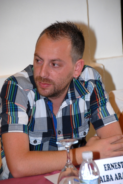 Ernesto Alba